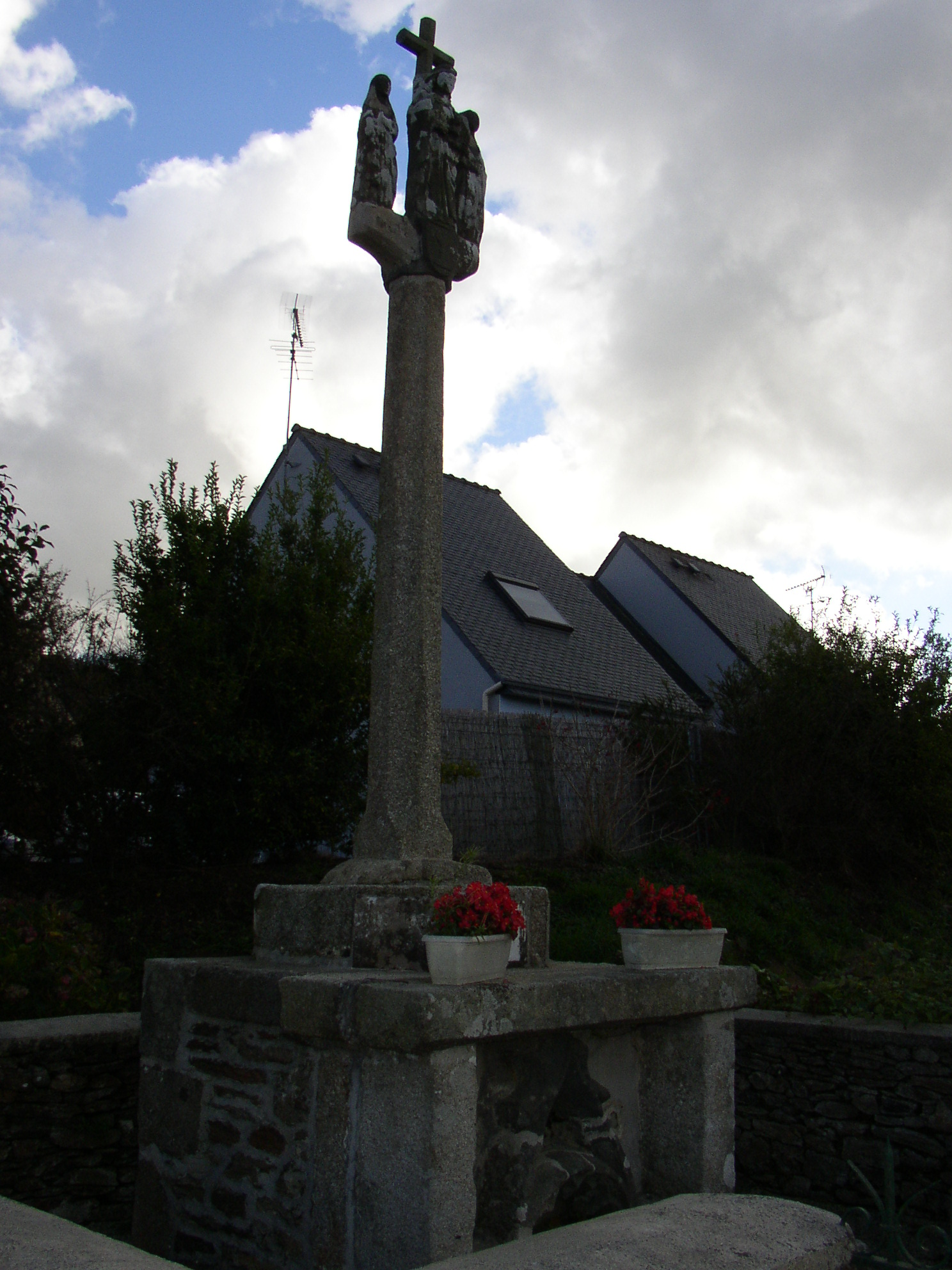 Calvaire du Prat Guen Auteur: GALLIOU date: Novembre 2005